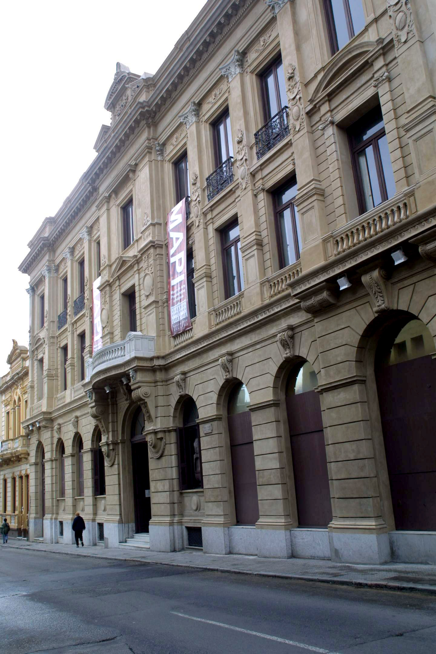 Fachada del Edificio